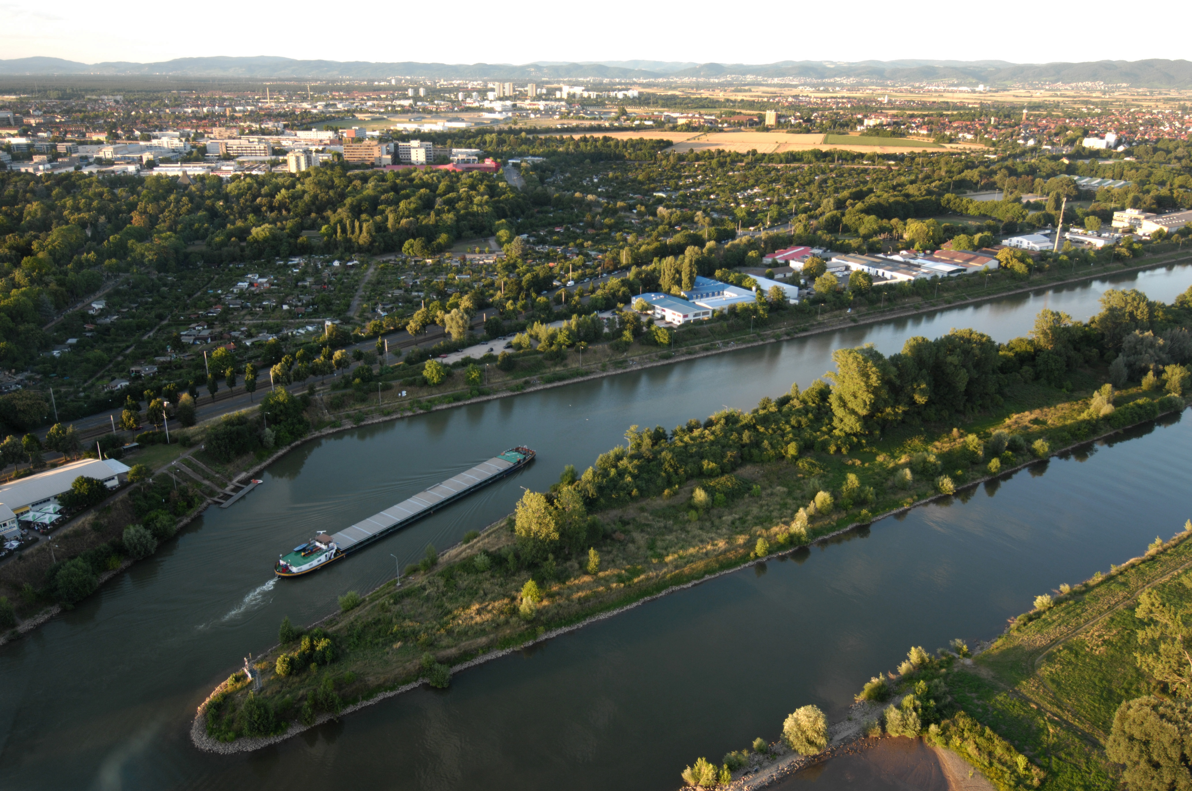 Neckarkanal in Mannheim; in der Flussmitte das Naturschutzgebiet „Unterer Neckar: Maulbeerinsel“